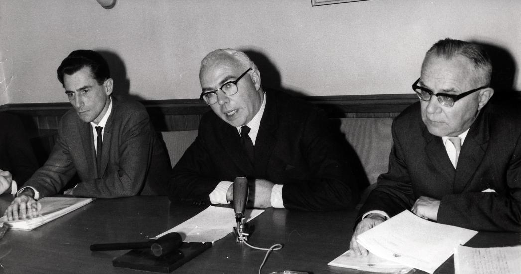 Minister G.M.J. Veldkamp (KVP) (midden) tijdens een persconferentie. Den Haag, Nederland, 1964.